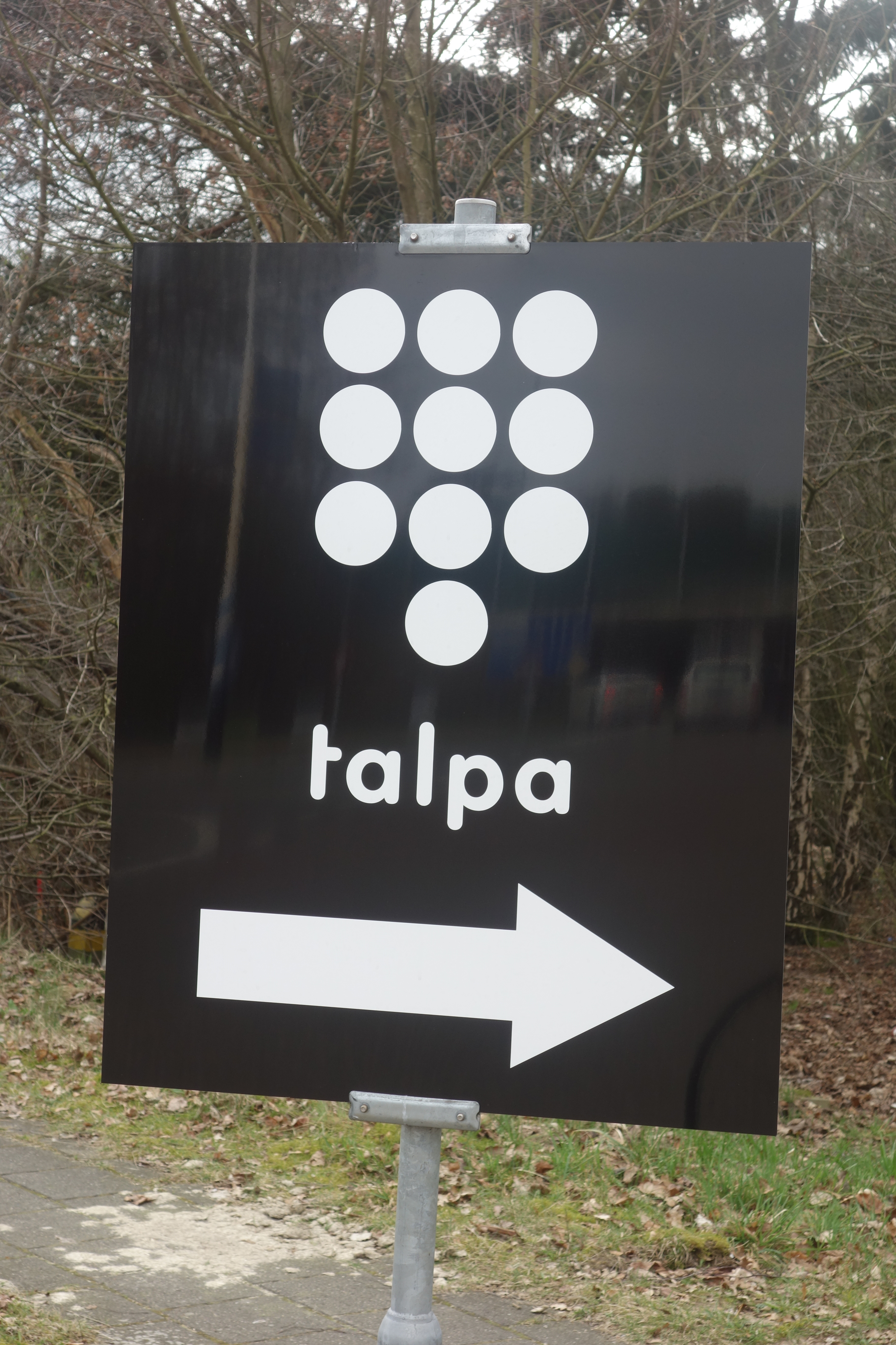 Richtingsbord Talpa in Bussum, 2017